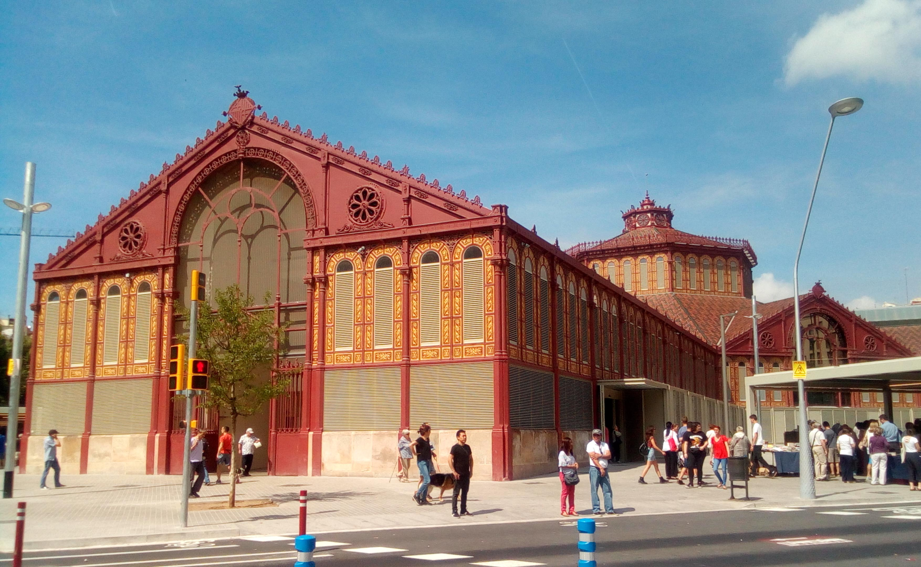 Mercado de San Antonio.